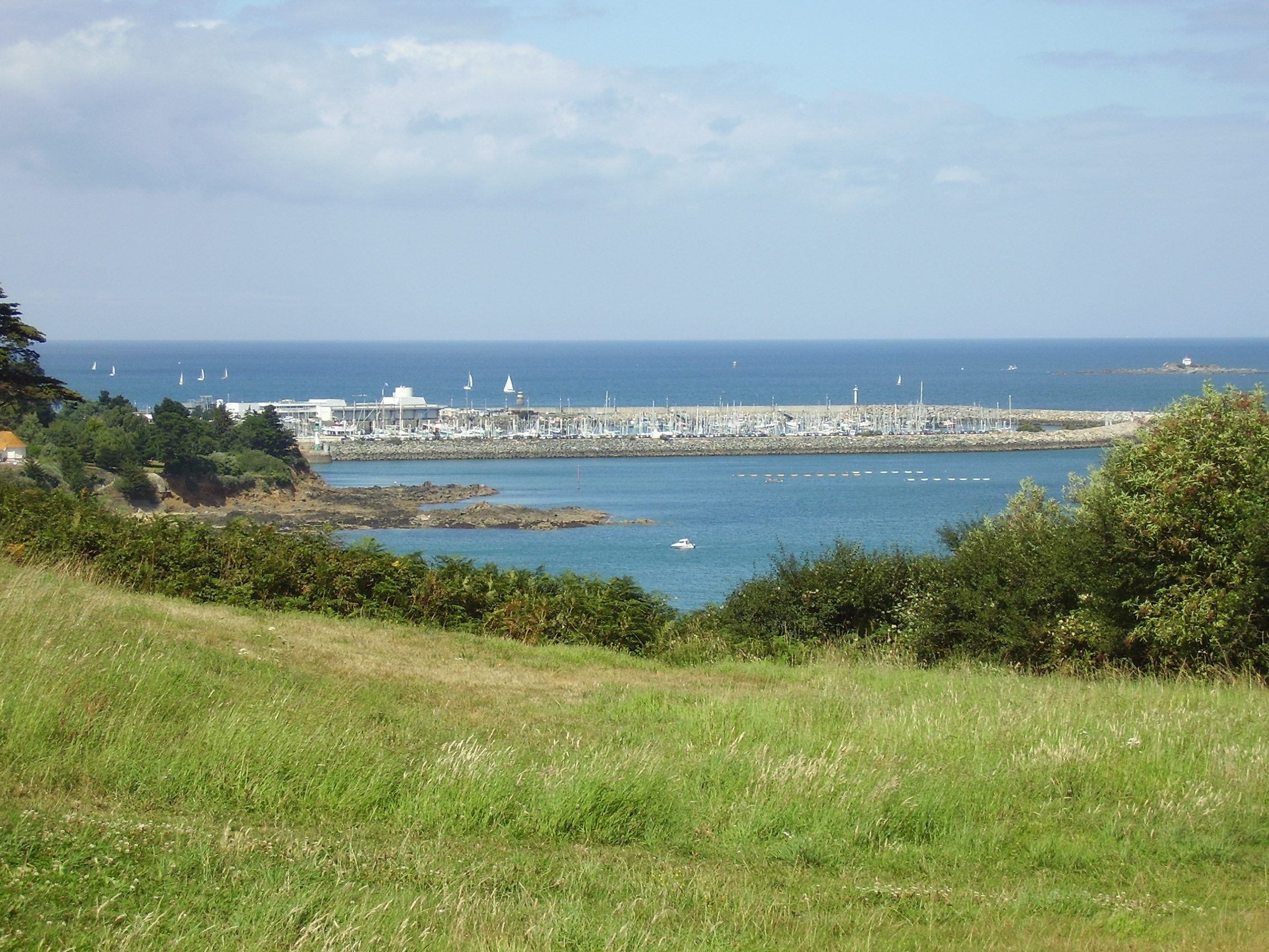 Saint-Quay-Portrieux, France. Le nouveau port en eau profonde. On distingue sur la gauche le phare terminant la jetée du vieux port.